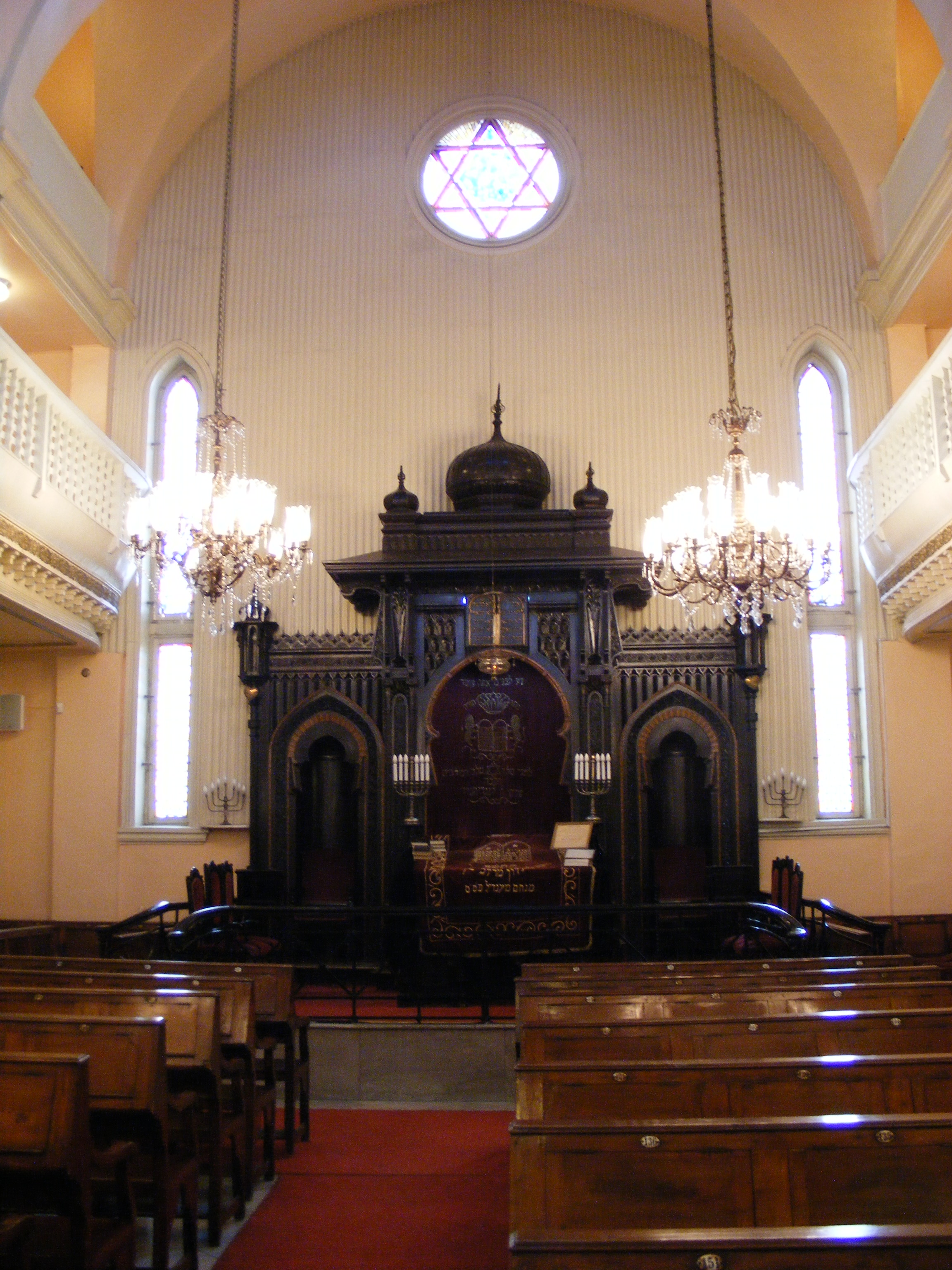 Istanbul Ashkenazi Sinagogue interior